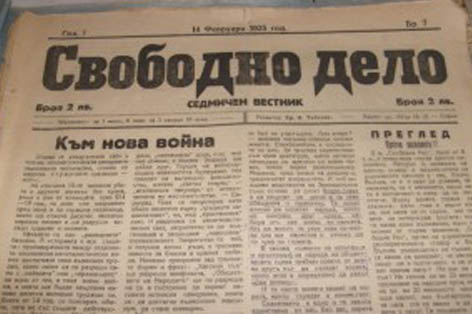 Вестник "Свободно дело", излиза от декември 1924 г. до януари 1925 г. в София, под редакцията на безвластника Христо Табаков. Отпечатани 8 броя.